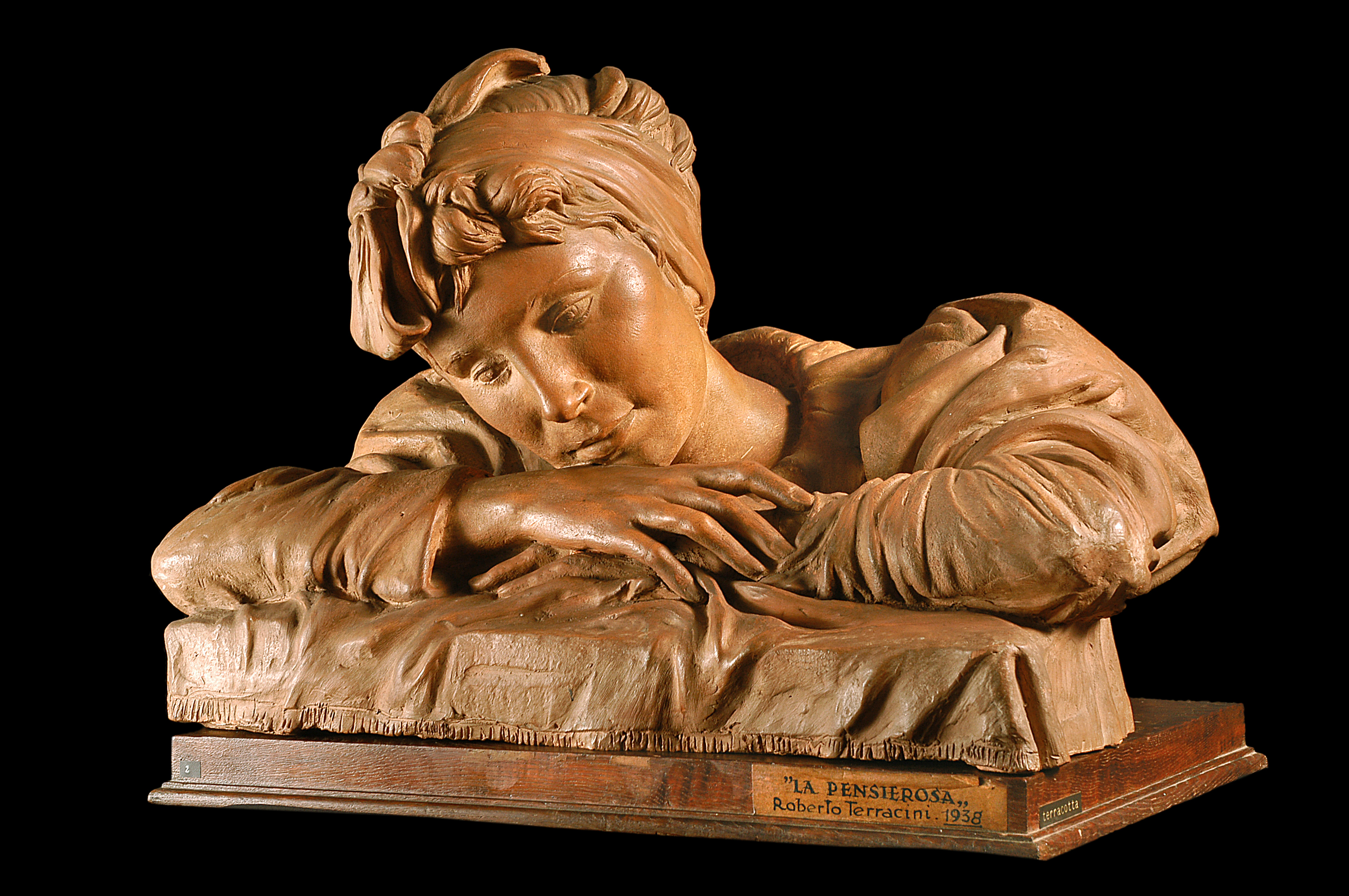 La Pensierosa, terracotta